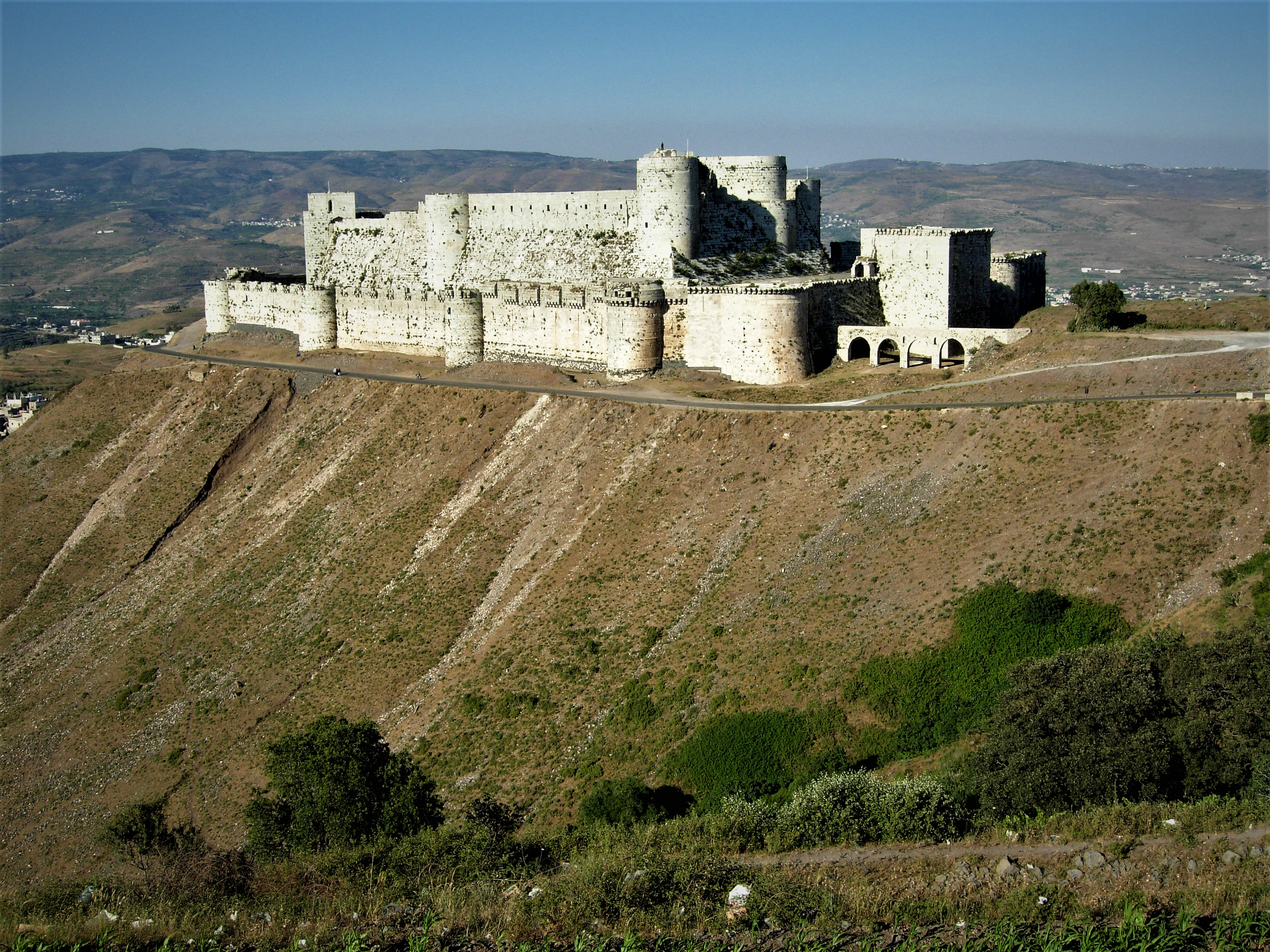 中文（台灣）: 敘利亞騎士堡外觀